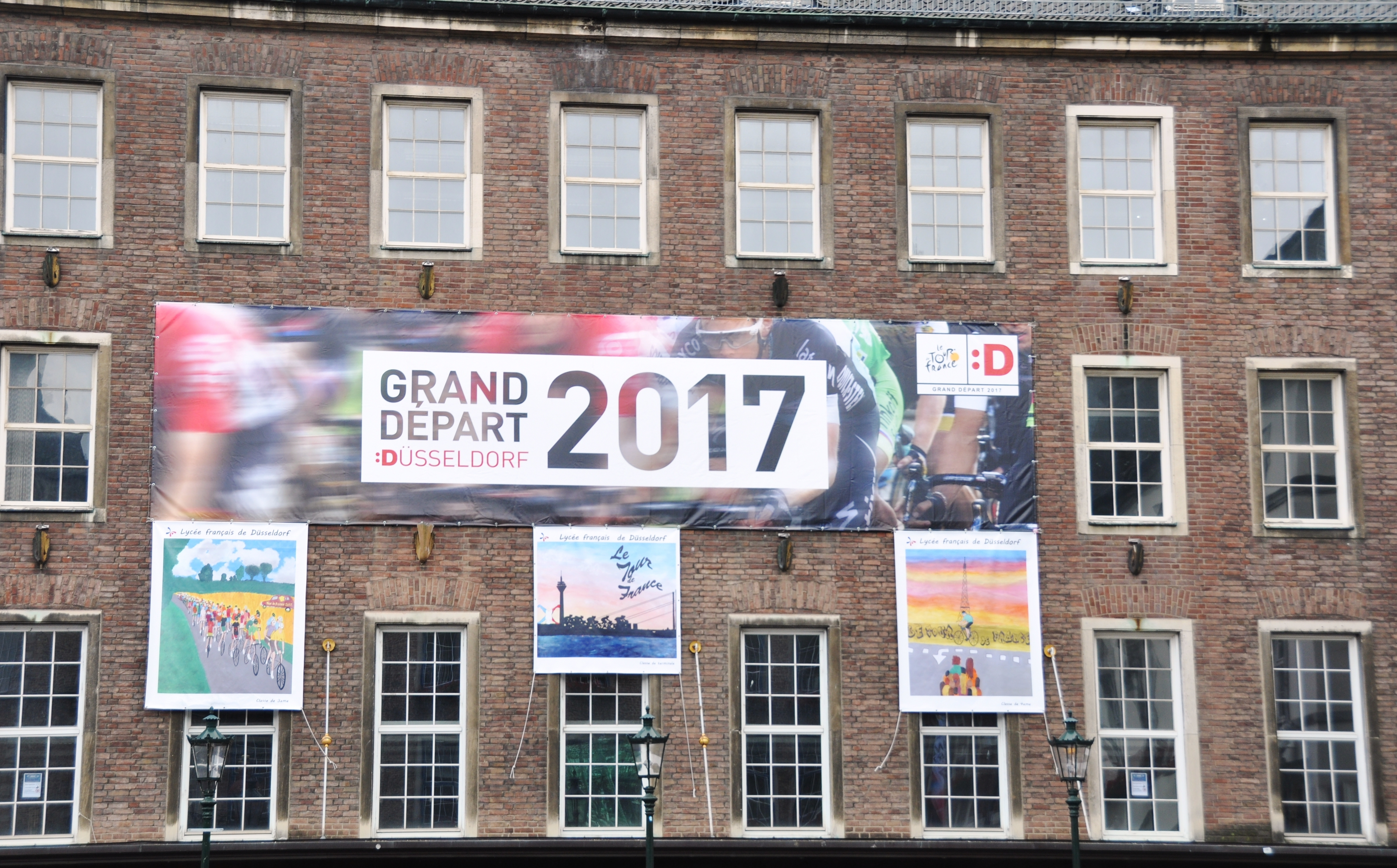 Marktplatz The making of this document was supported by the Community-Budget of Wikimedia Germany.